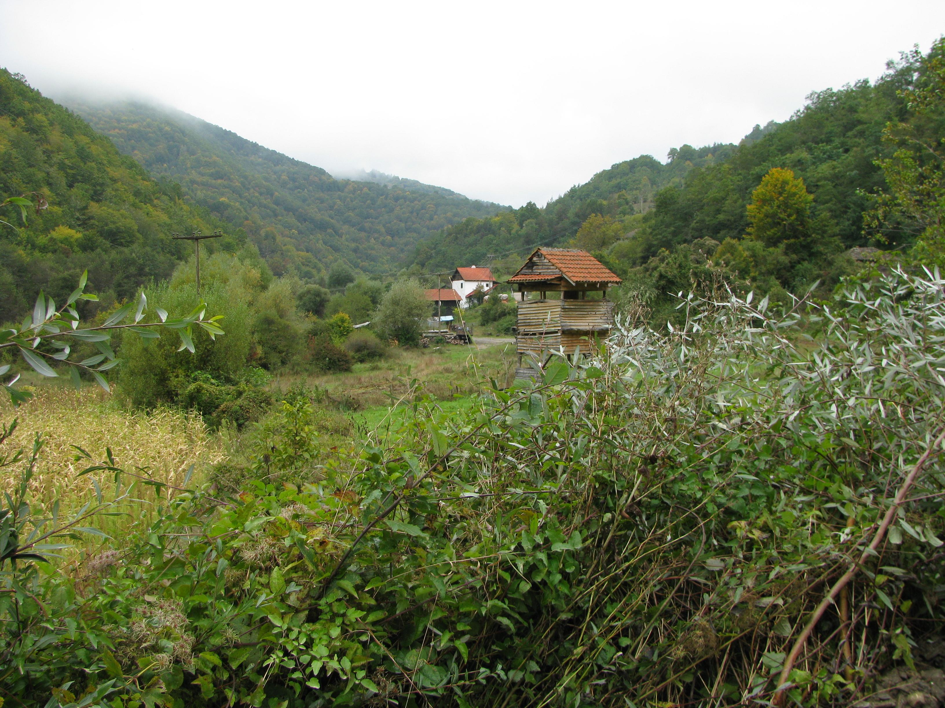 Рикачево, део села уз Бистарску реку.